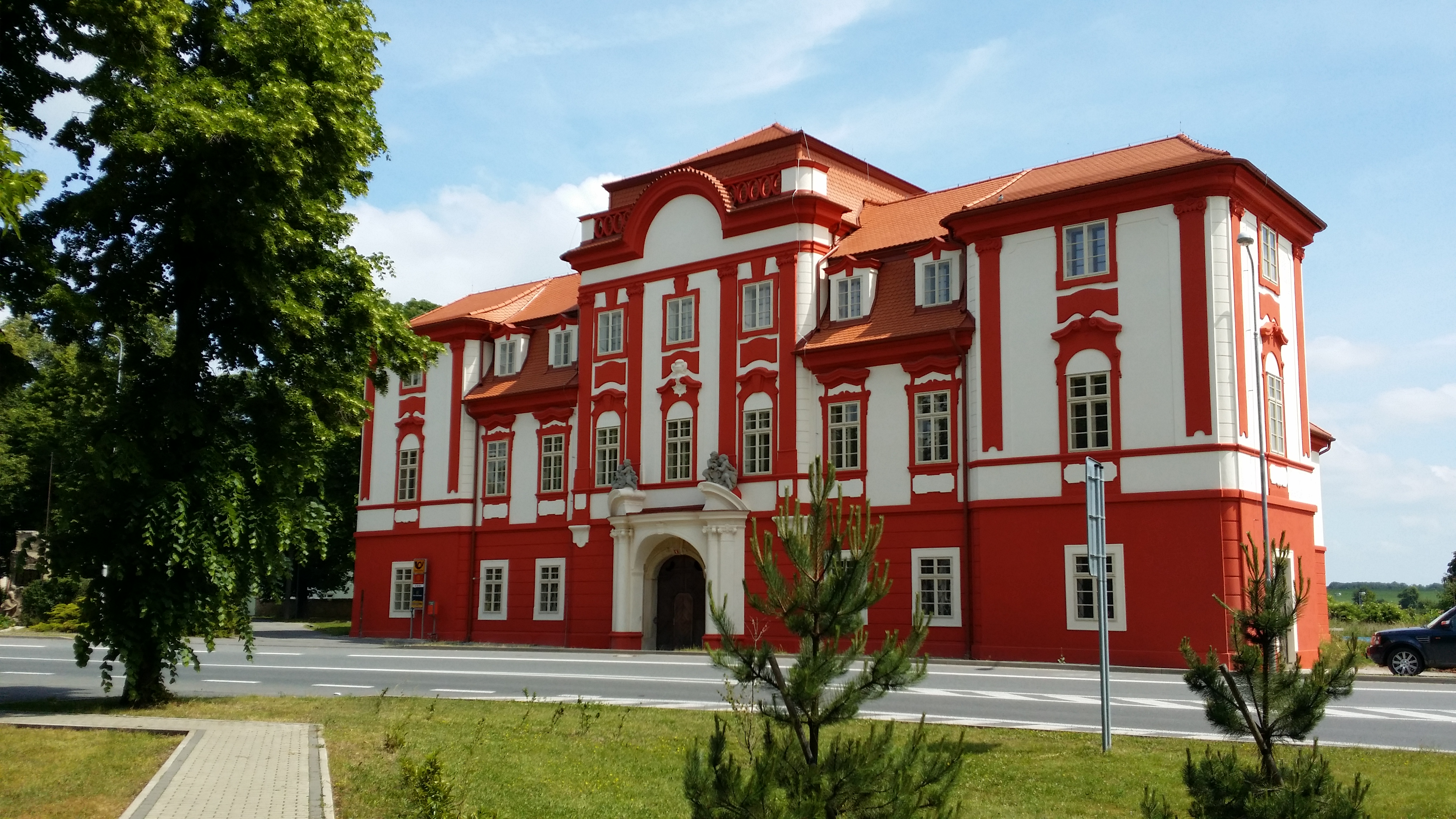 Bývalá jednoduchá obdélná renesanční tvrz se dochovala v části sklepů a v přízemí. Pozdější úpravy daly zámku dnešní pozdně barokní vzhled. Jedná se především o zavěšené pilastry s dekorativním dříkem, stejně jako polokruhově vytažená korunní římsa nad hlavním vstupem. K hlavnímu průčelí zámku jsou po obou stranách symetricky připojené čtvercové třípodlažní pavilony